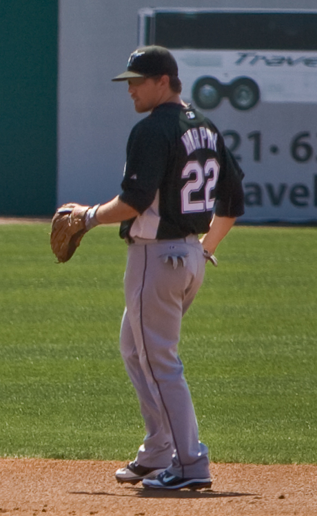 Donnie Murphy